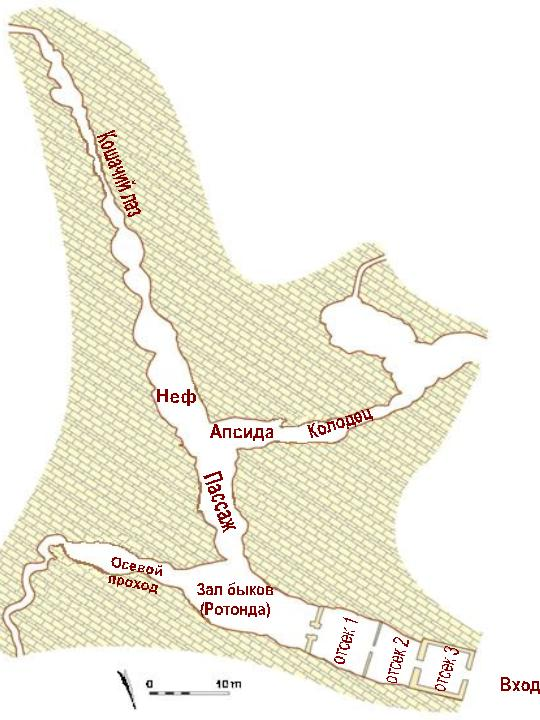 map of Lascaux cave, Dordogne, France (redrawn after A. Leroi-Gourhan, (1984), « Grotte de Lascaux », in L'art des cavernes - Atlas des grottes ornées paléolithiques françaises, Ministère de la culture, ISBN 2-11-080817-9) with russian titles